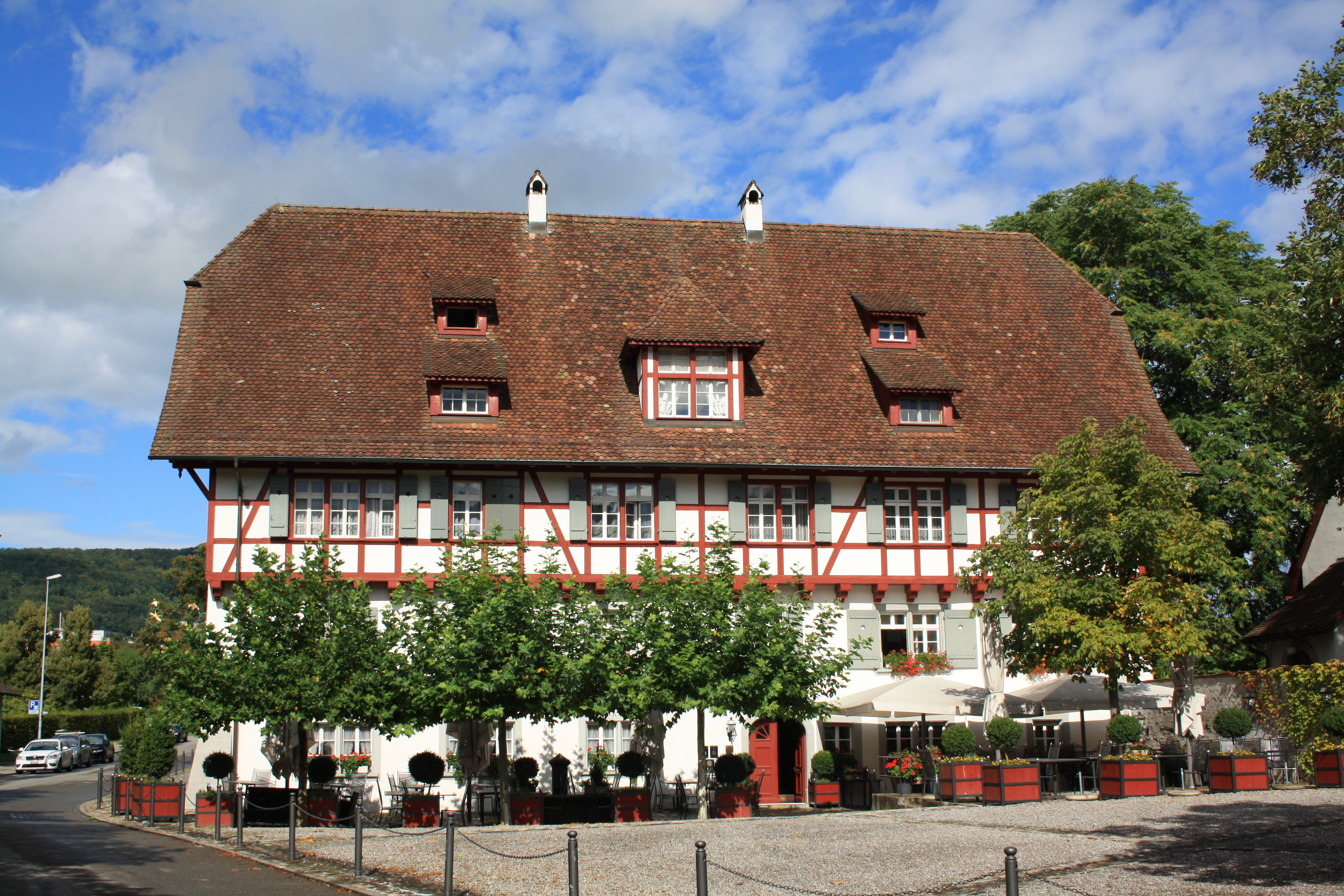 Restaurant Sternen